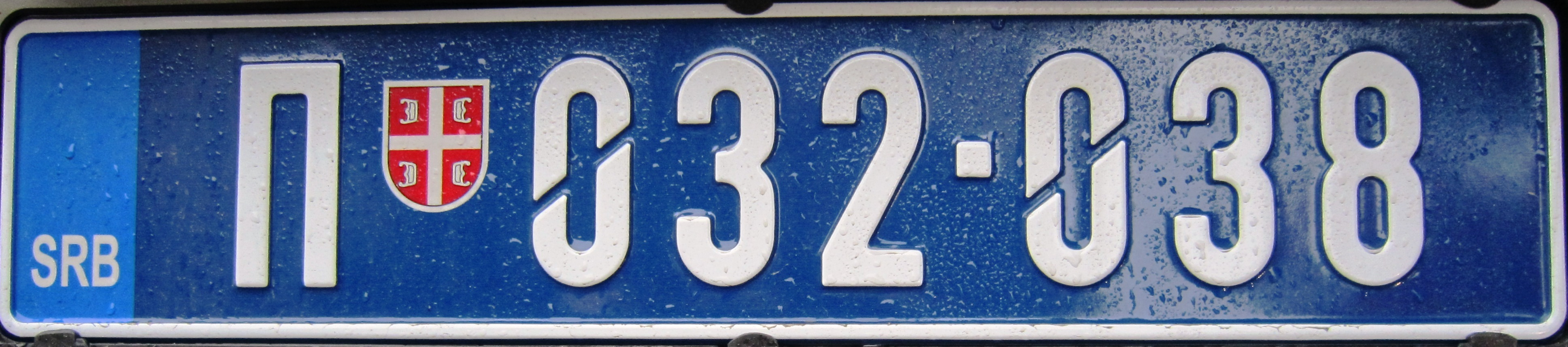 Servische politie kentekenplaat